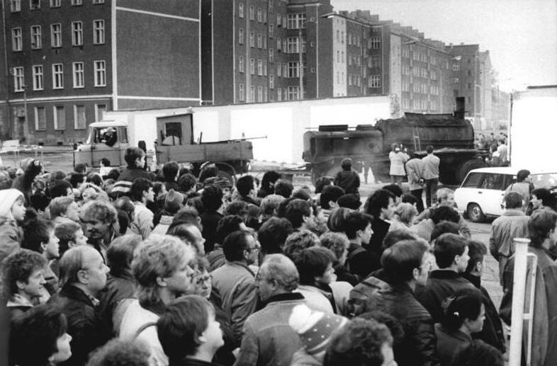 ADN-ZB-Settnik-11.11.89-Berlin: Grenztruppen der DDR errichteten in Höhe der Oderberger -Schwedter Straße den neuen Übergang Eberswalder Straße. Die Arbeiten wurden von einer großen Menschenmenge mit Genugtuung beobachtet.